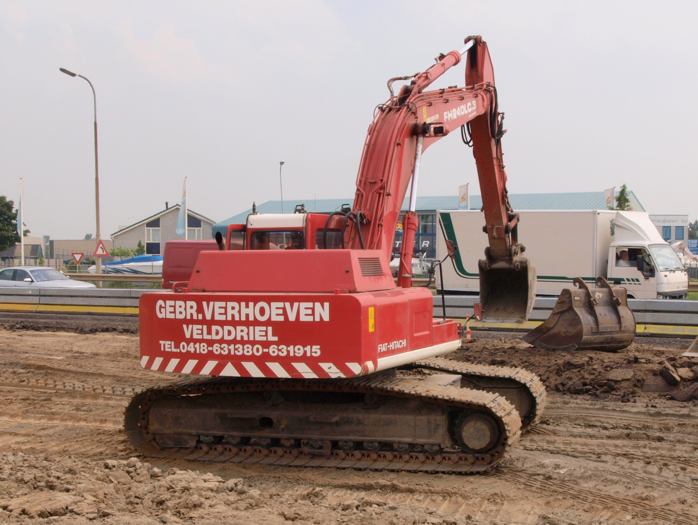 Fiat Hitachi FH240LC.3